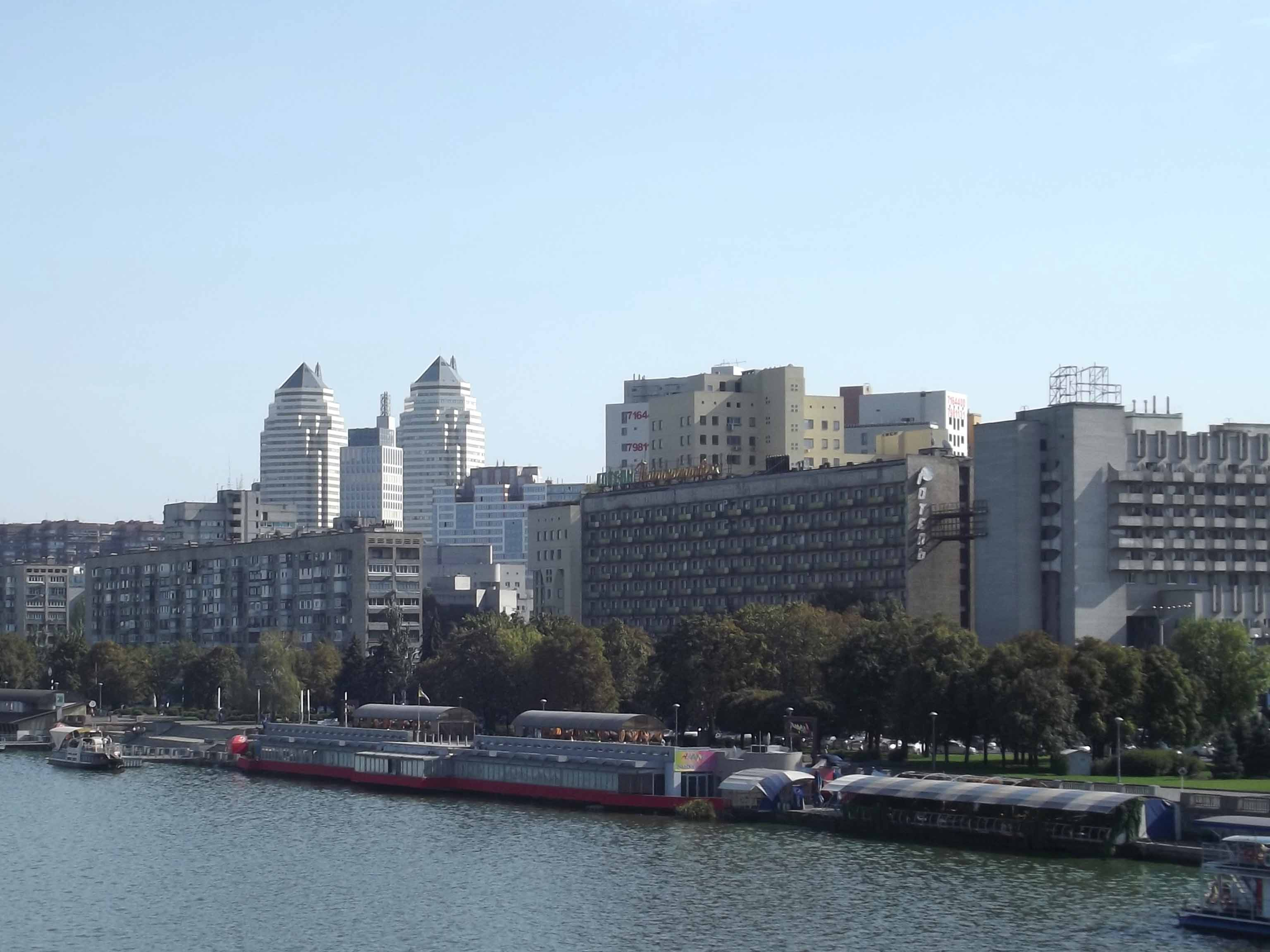 Вид с моста